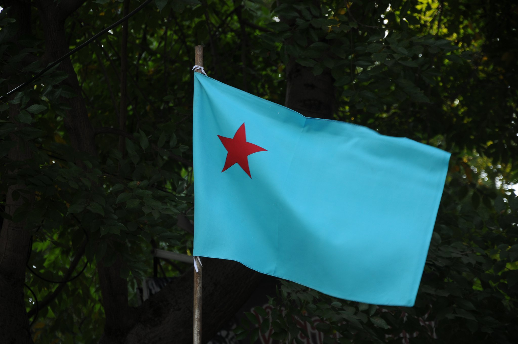 കാംപസ് ഫ്രണ്ട് പതാക